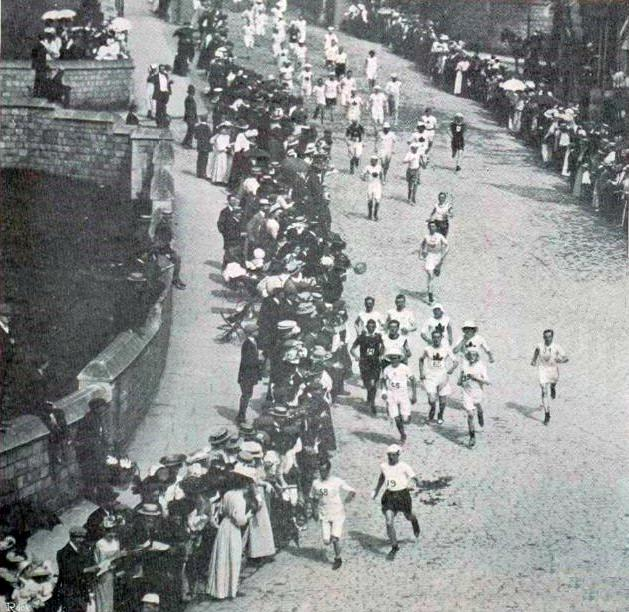 Jeux Olympiques de 1908, départ du Marathon dans les jardins du Château royal de Windsor.